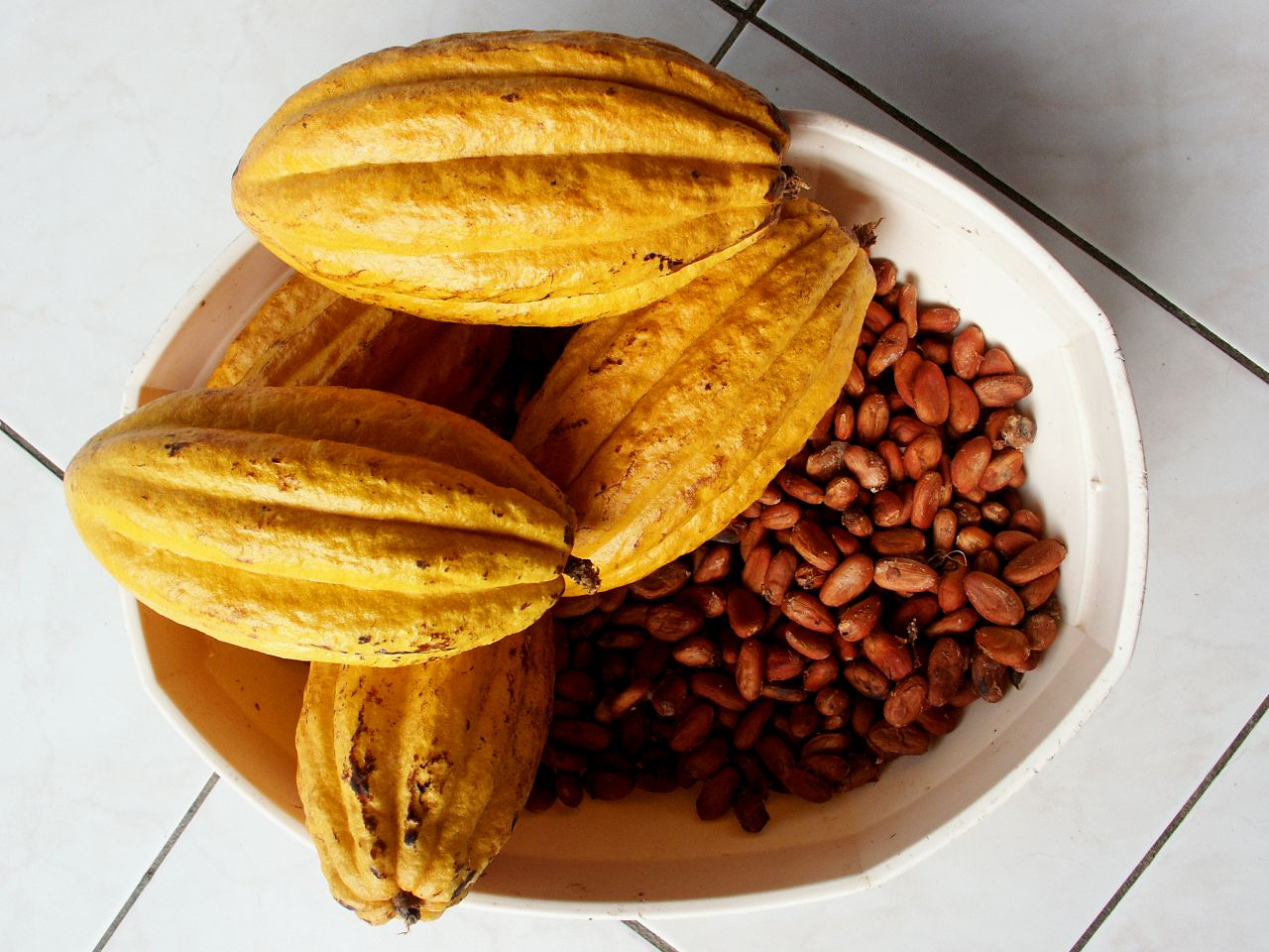 Cabosses et graines de cacaoyer.